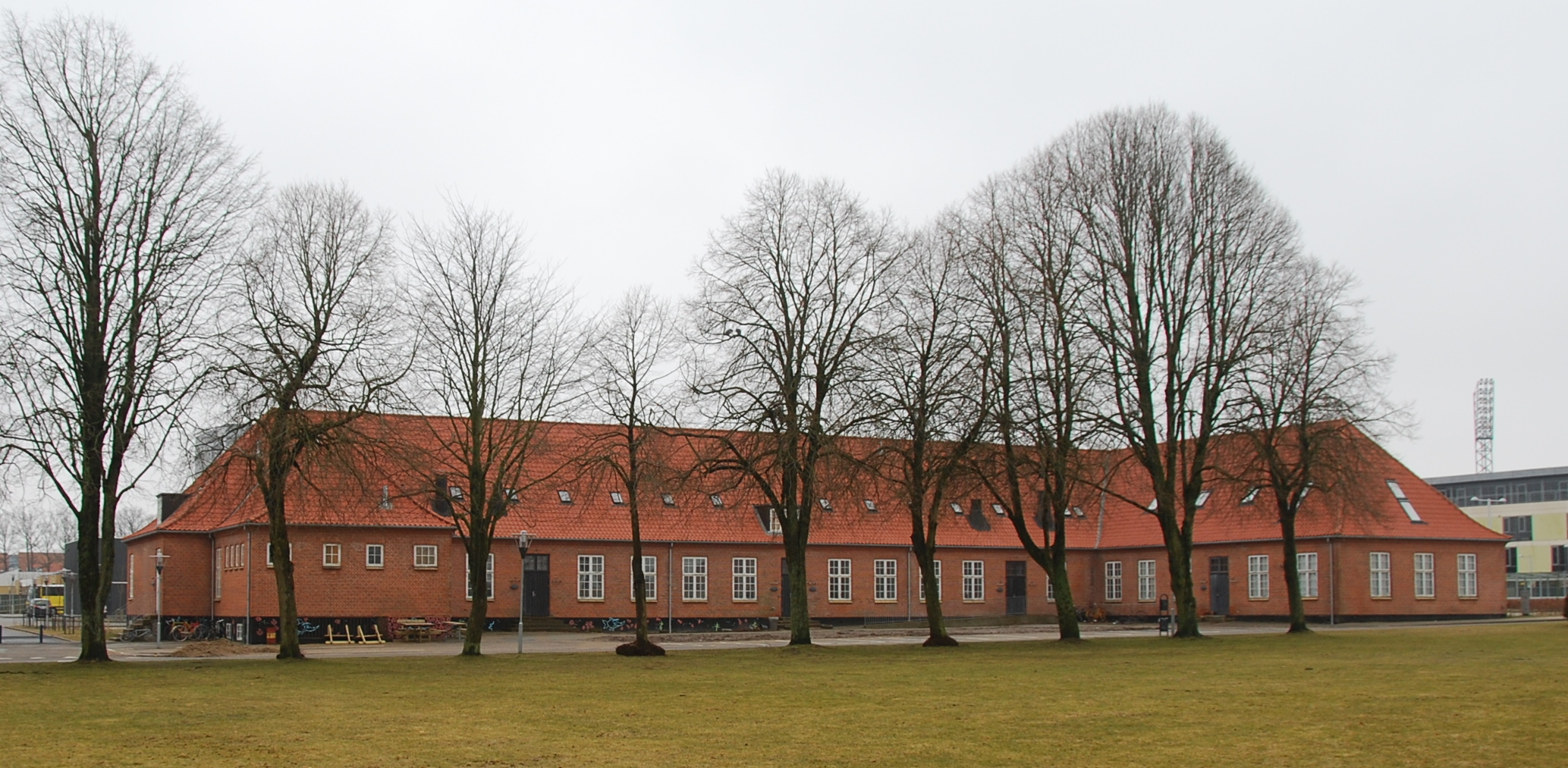 Mandskabsbygning på Viborg Kaserne, set fra Paradepladsen.